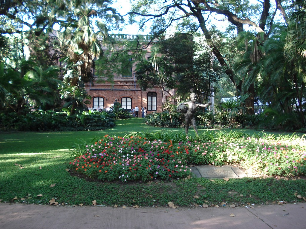 Entrada del jardín botánico Carlos Thays de la Ciudad Autónoma de Buenos Aires, Argentina.